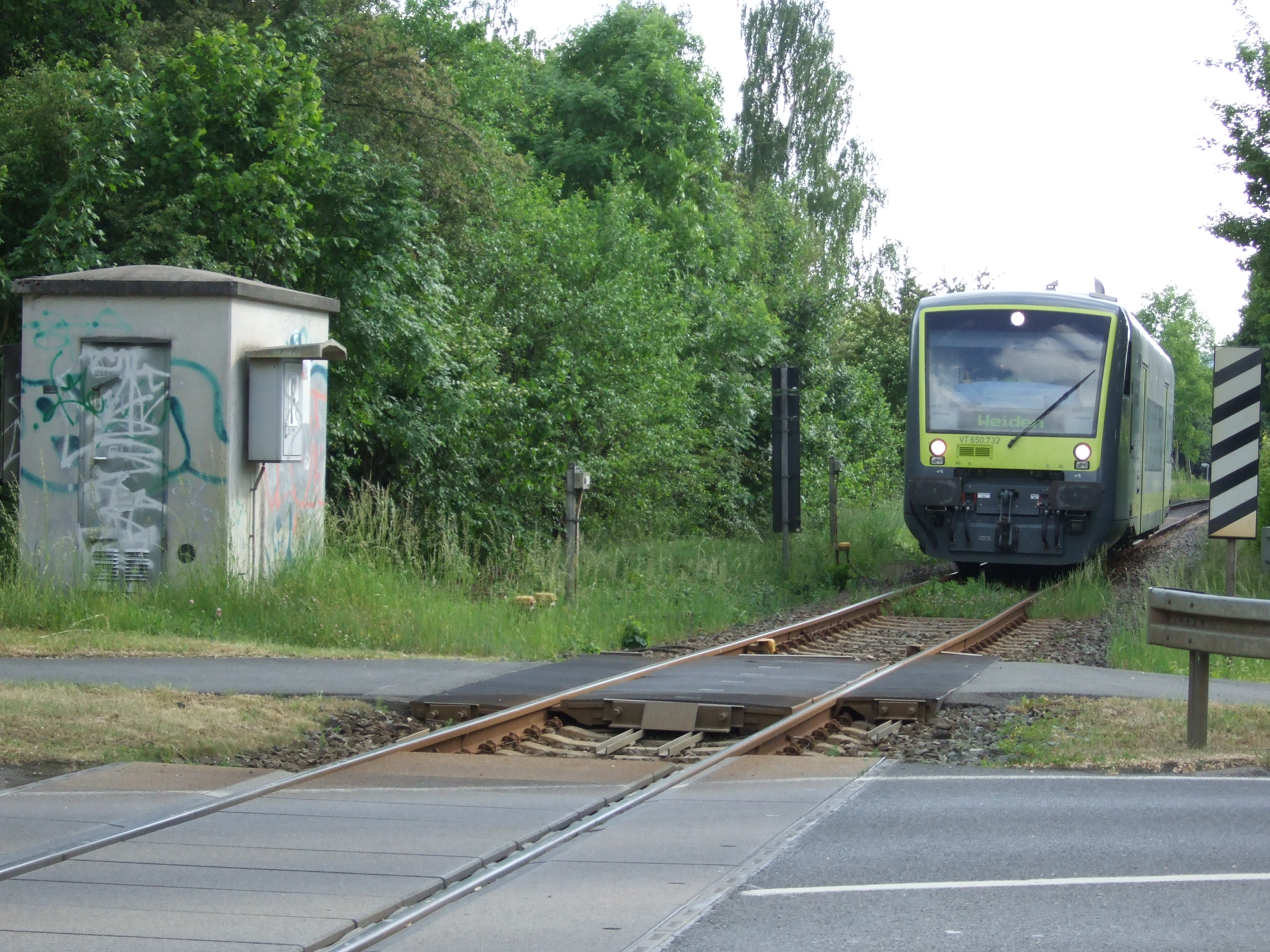 Triebwagen Bayreuth Königsallee